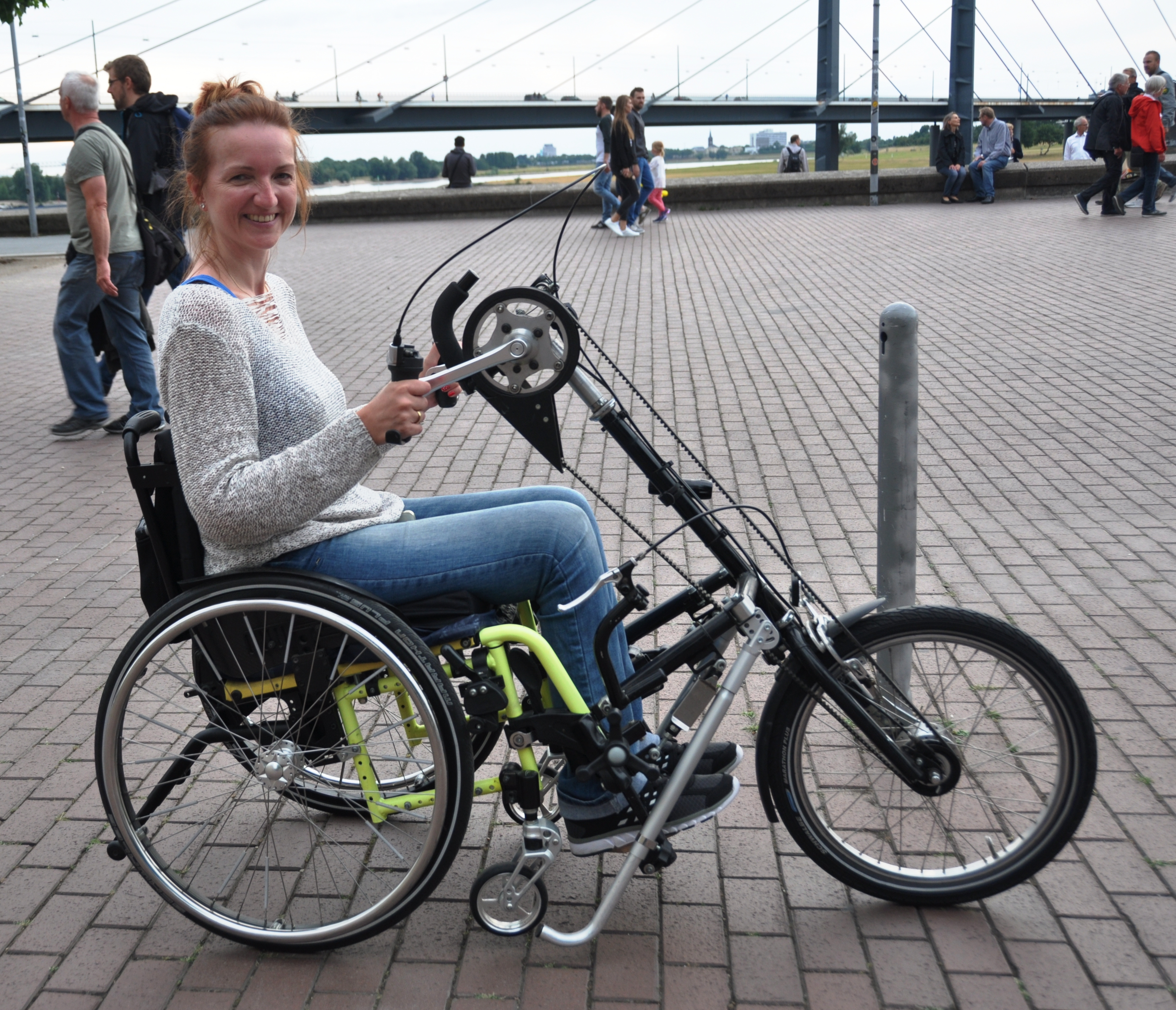 Adaptivbike von Stricker auf der Rheinpromenade in Düsseldorf